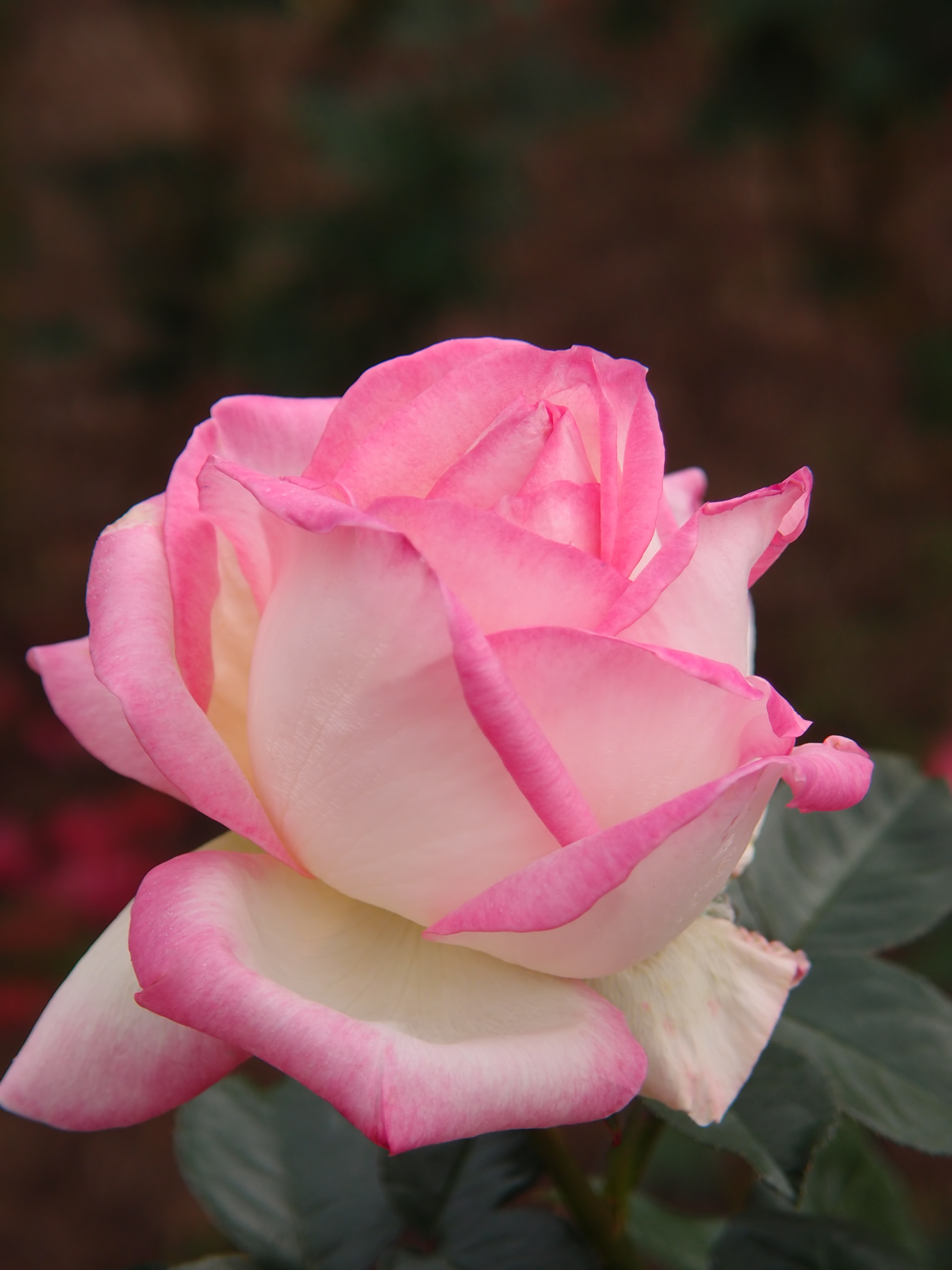 Rose Princesse de Monaco バラ プリンセス ドゥ モナコ Hybrid Tea rose ハイブリッドティーローズ France フランス Meilland 1982